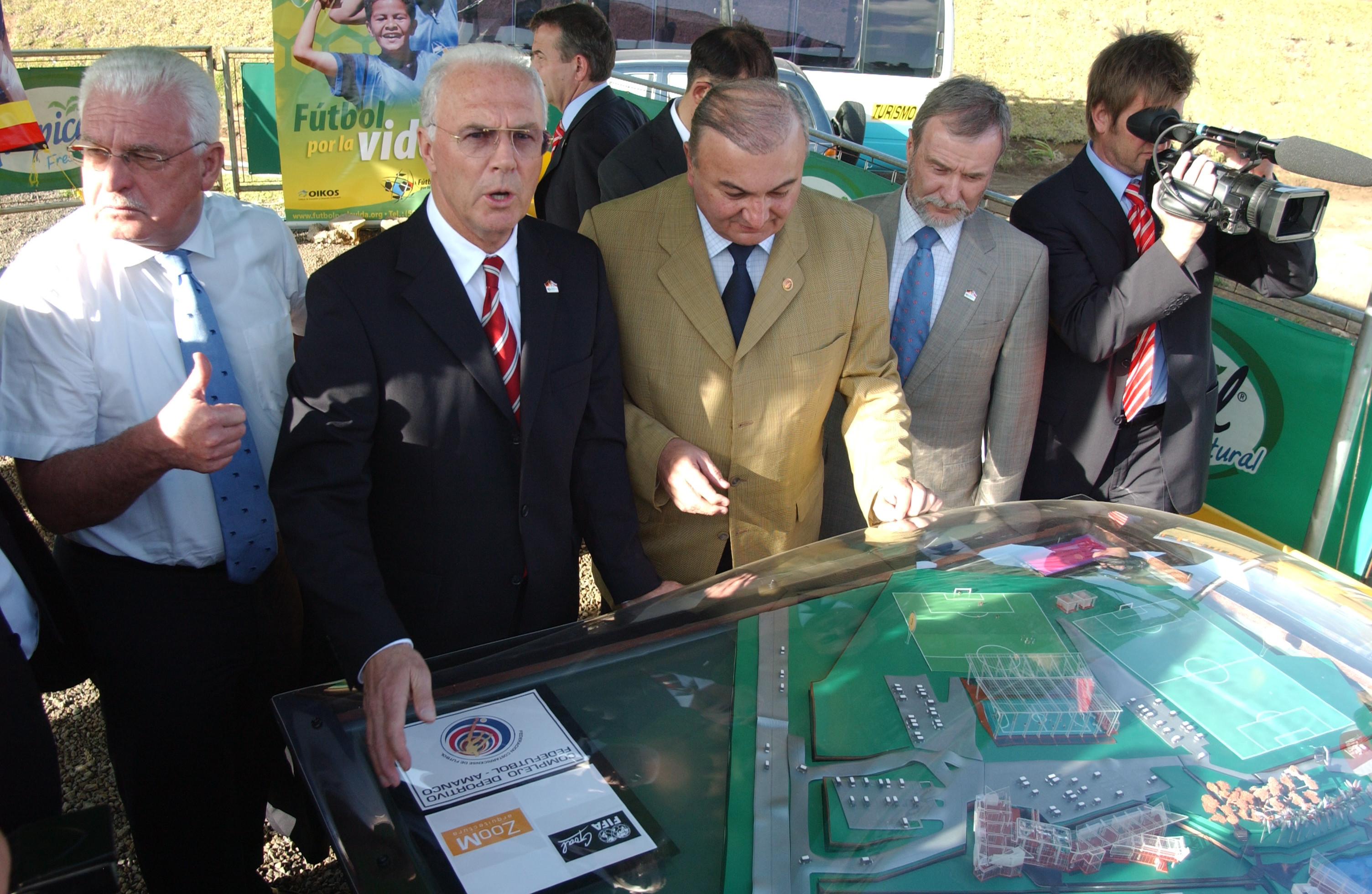 Franz Beckenbauer y Hermes Navarro ex-presidente de la UNAFUT (Costa Rica)